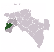 De lokaasje fan it Fredewold yn de provinsje Grinslân.